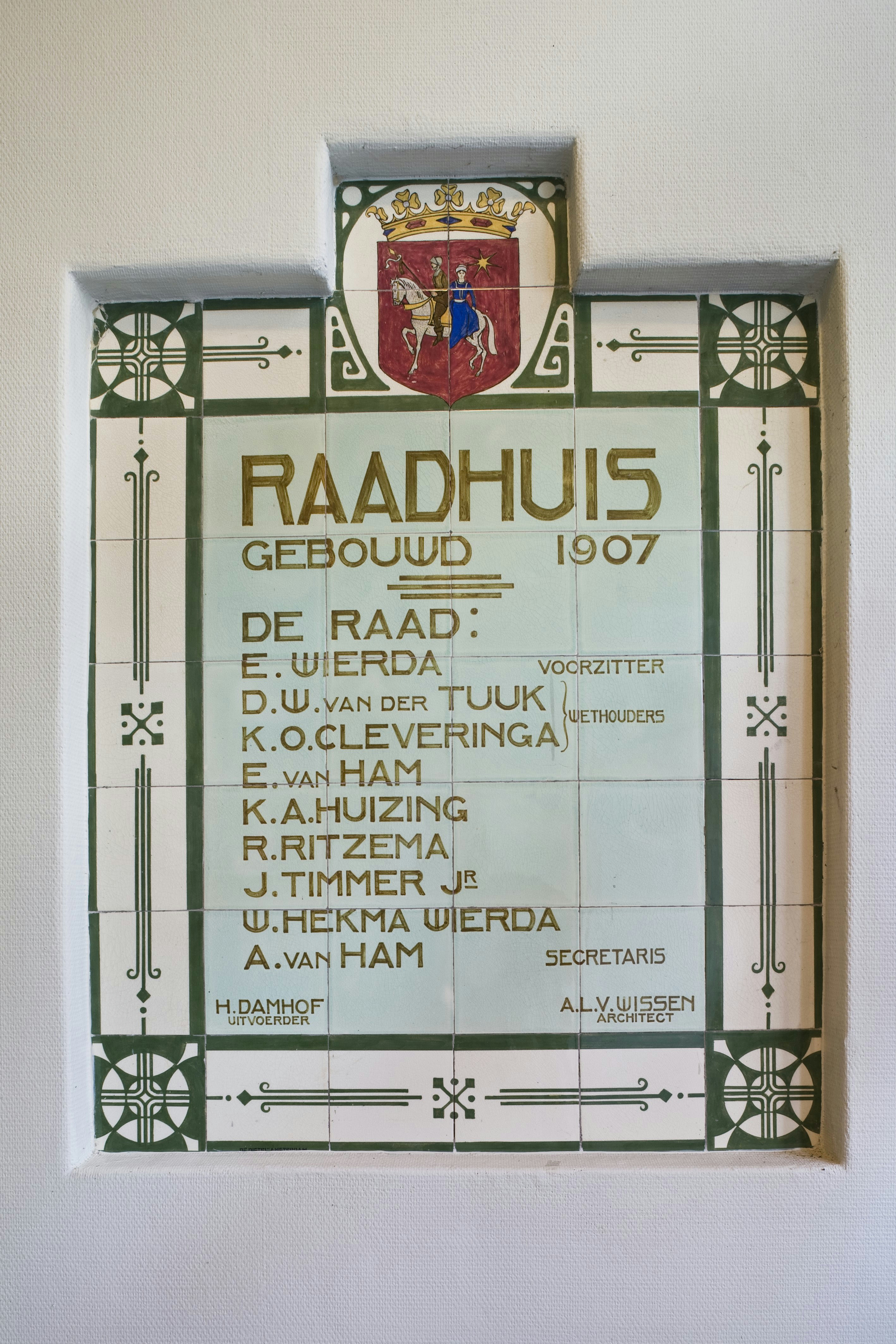 Voormalig raadhuis: Interieur, tegeltableau in de hal ter gelegenheid van de bouw in 1907 gemaakt door Plateelfabriek De Distel (opmerking: Het voormalige raadhuis, nu VVV-kantoor, maakt deel uit van nieuwe gemeentelijke bouwplannen)